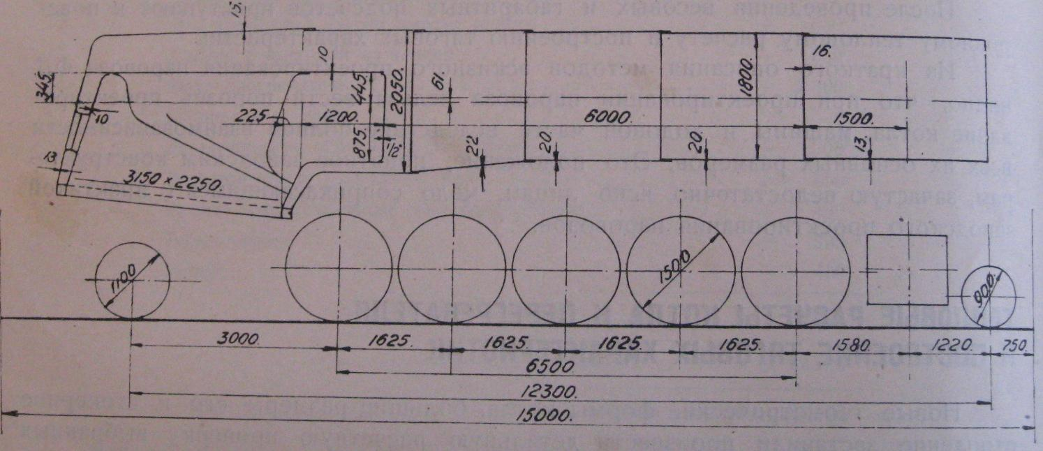 Эскизный проект паровоза ФД